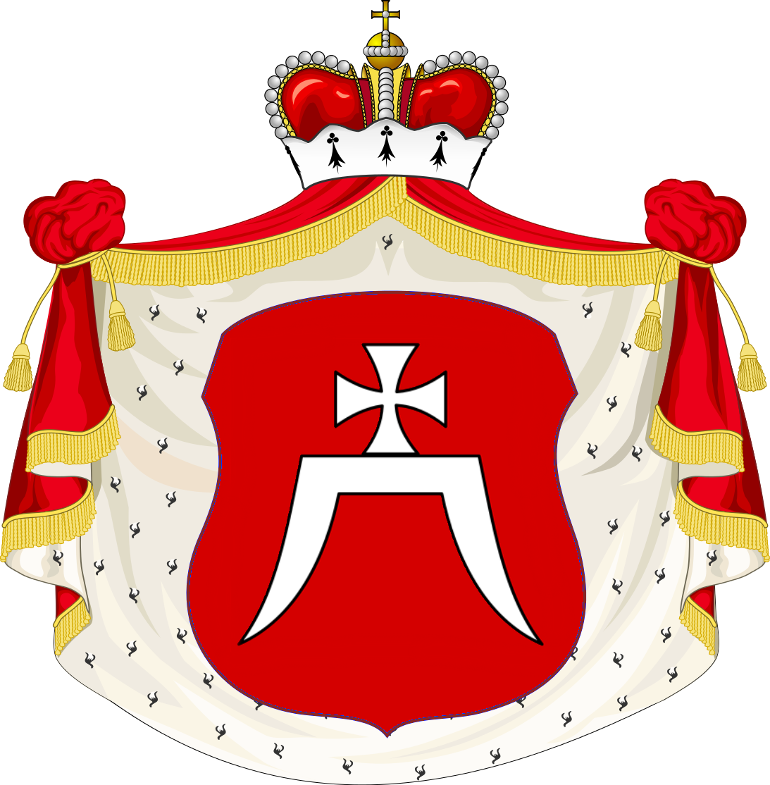 Герб князів Єловицьких